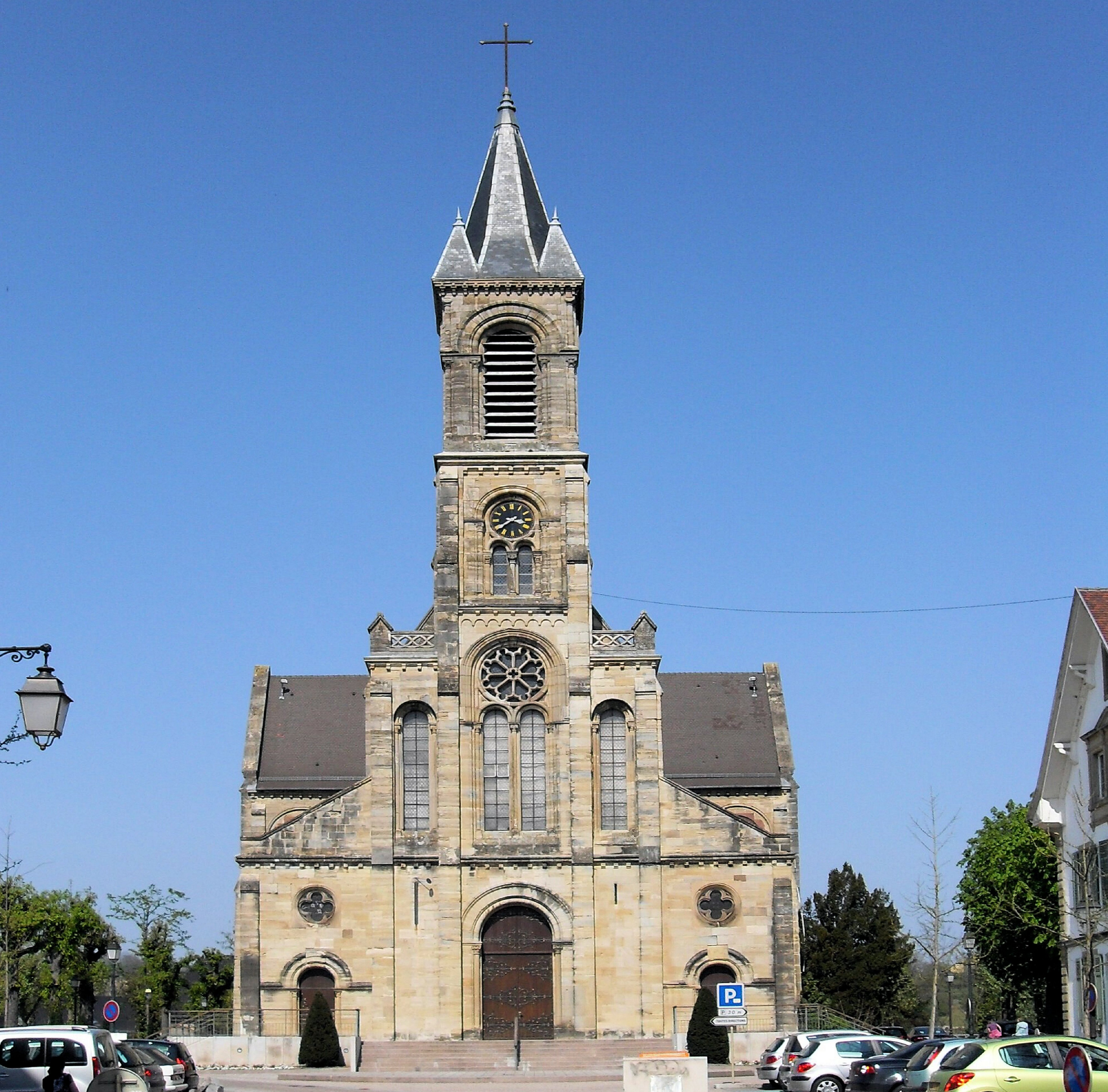 L'église Notre-Dame de l'Assomption d'Altkirch